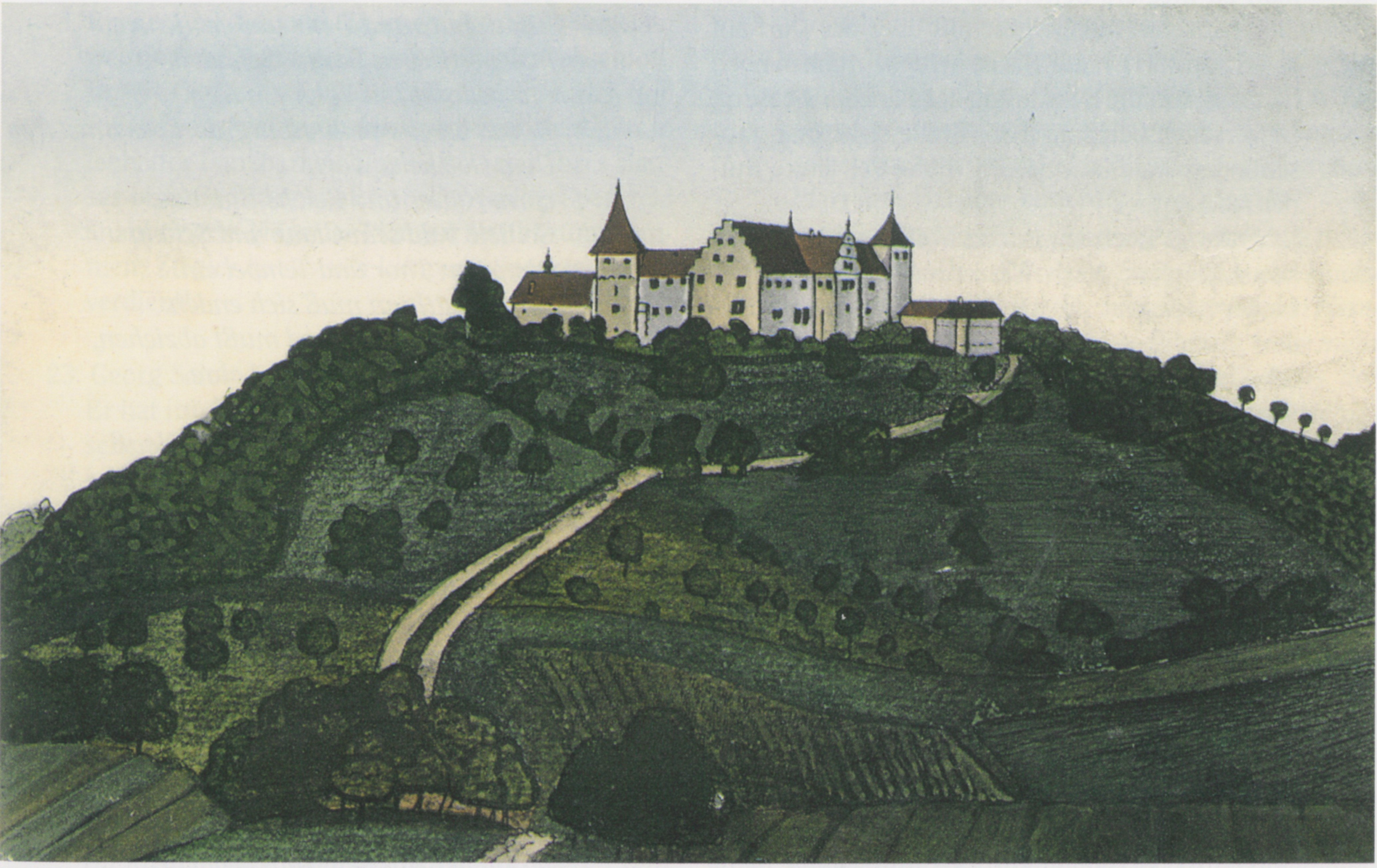 Bild von 1701, Burg Speckfeld bei Markt Einersheim